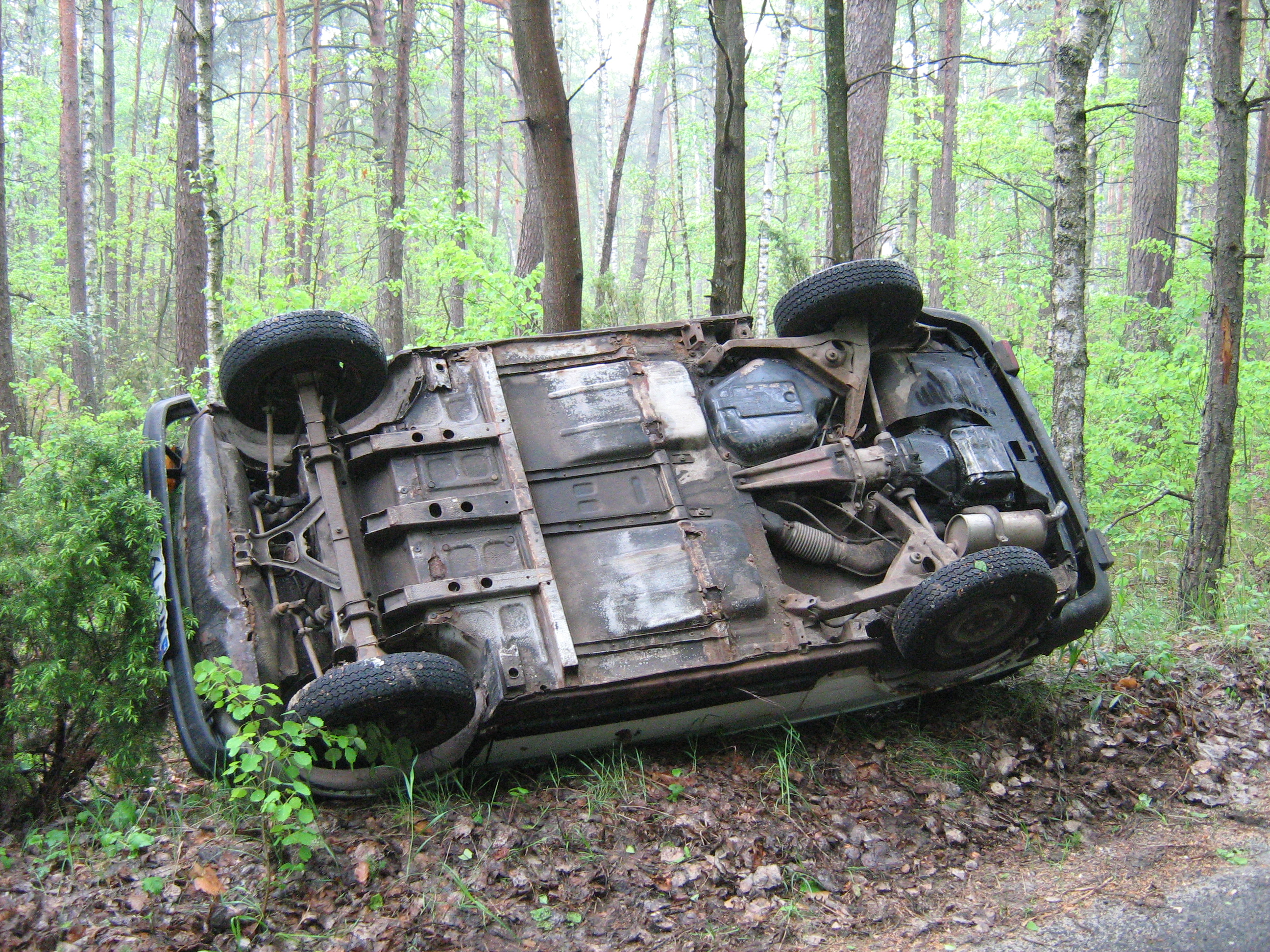 126p 650 - Polski Fiat on its side